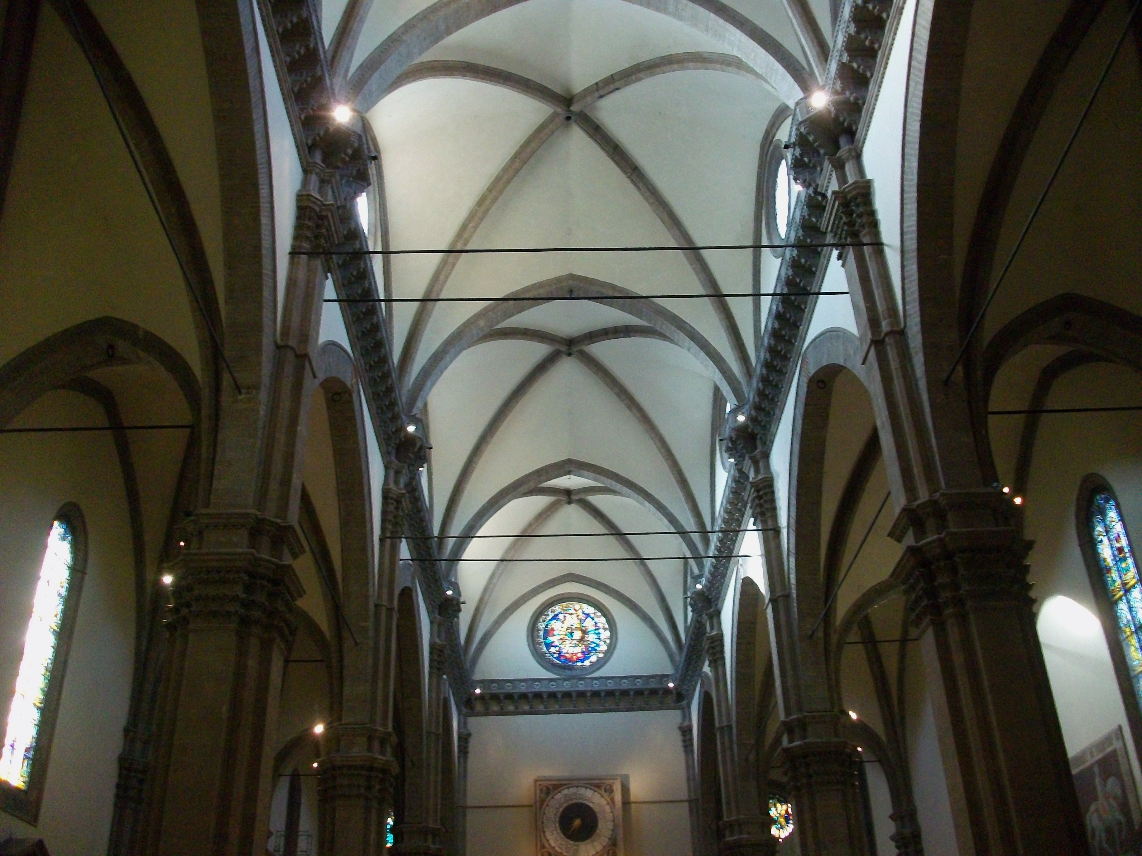 Interior de Santa Maria del Fiore (Florència).